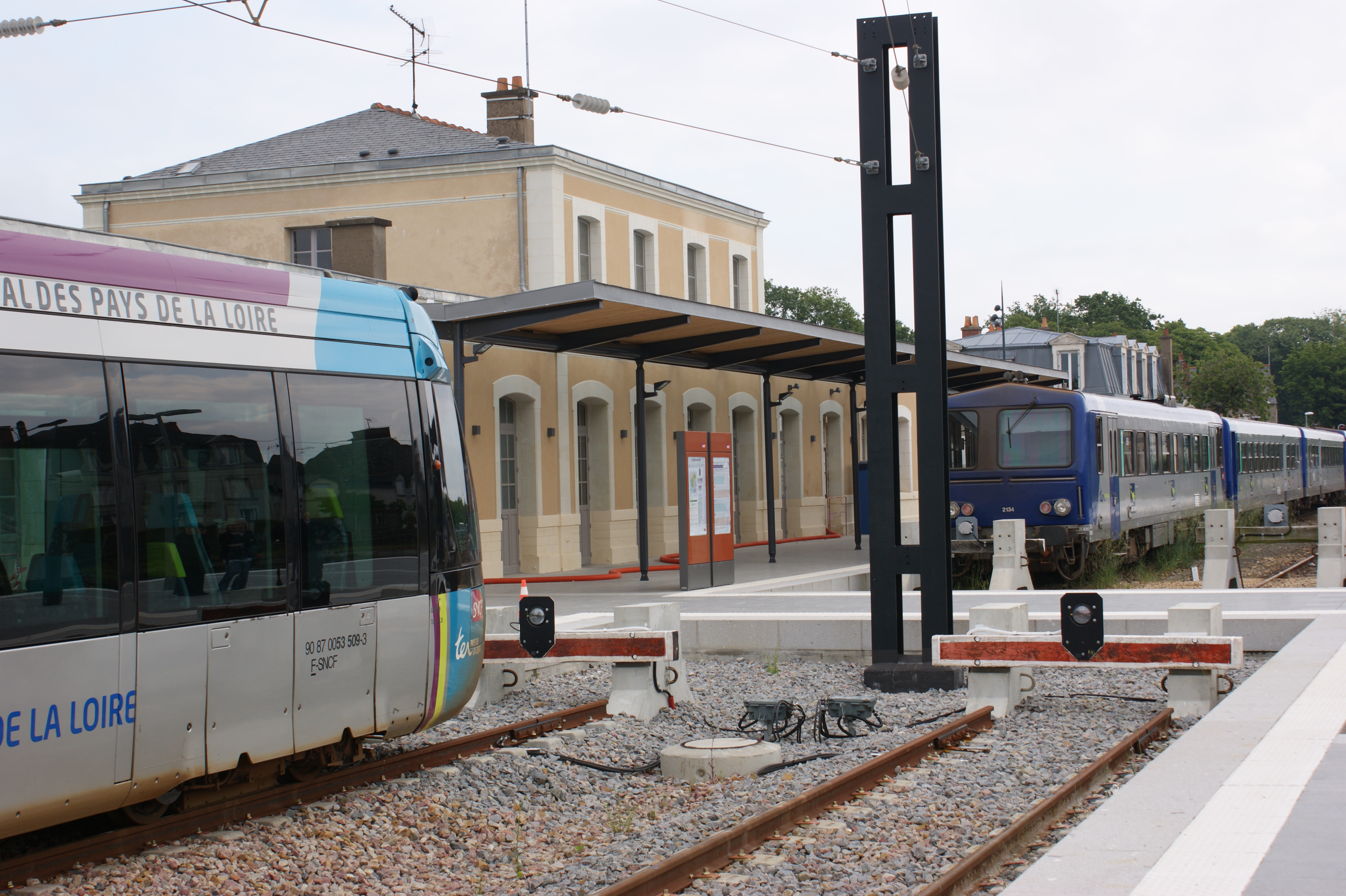 Gare de Châteaubriant, tram-train et TER séparés par les butoirs et le passage piéton.